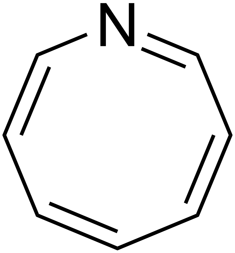 chemical structure of azocine (azacyclooctatetraene)